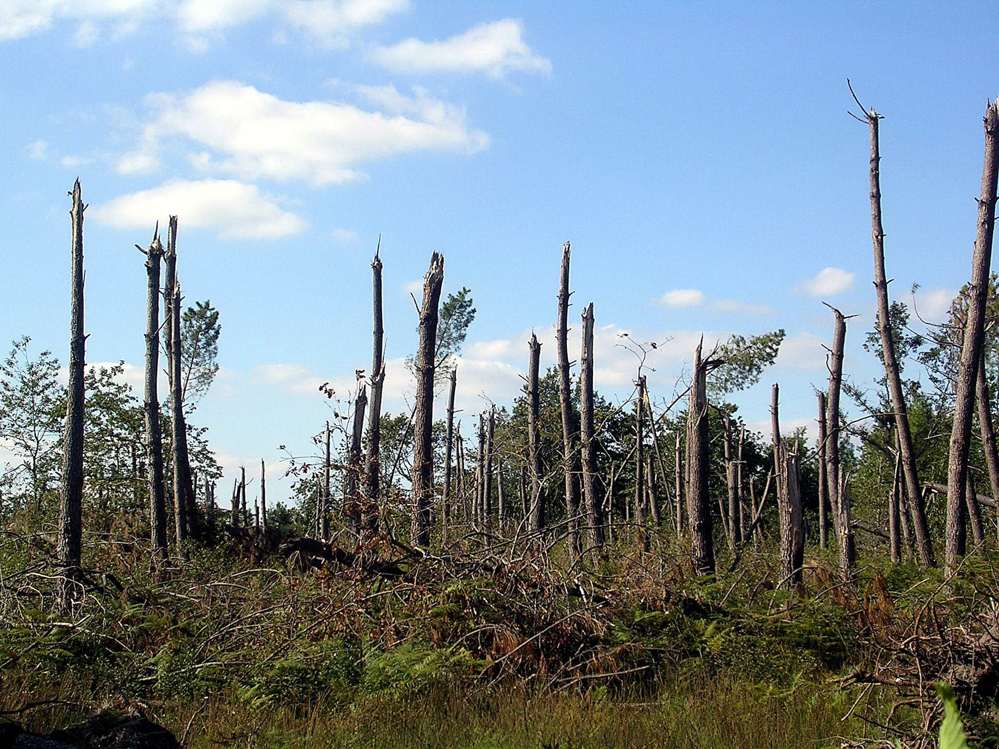 Dégâts provoqués par la tempête Klaus sur la forêt des Landes (ici, à Saint-Pierre-du-Mont, dans le département français des Landes)